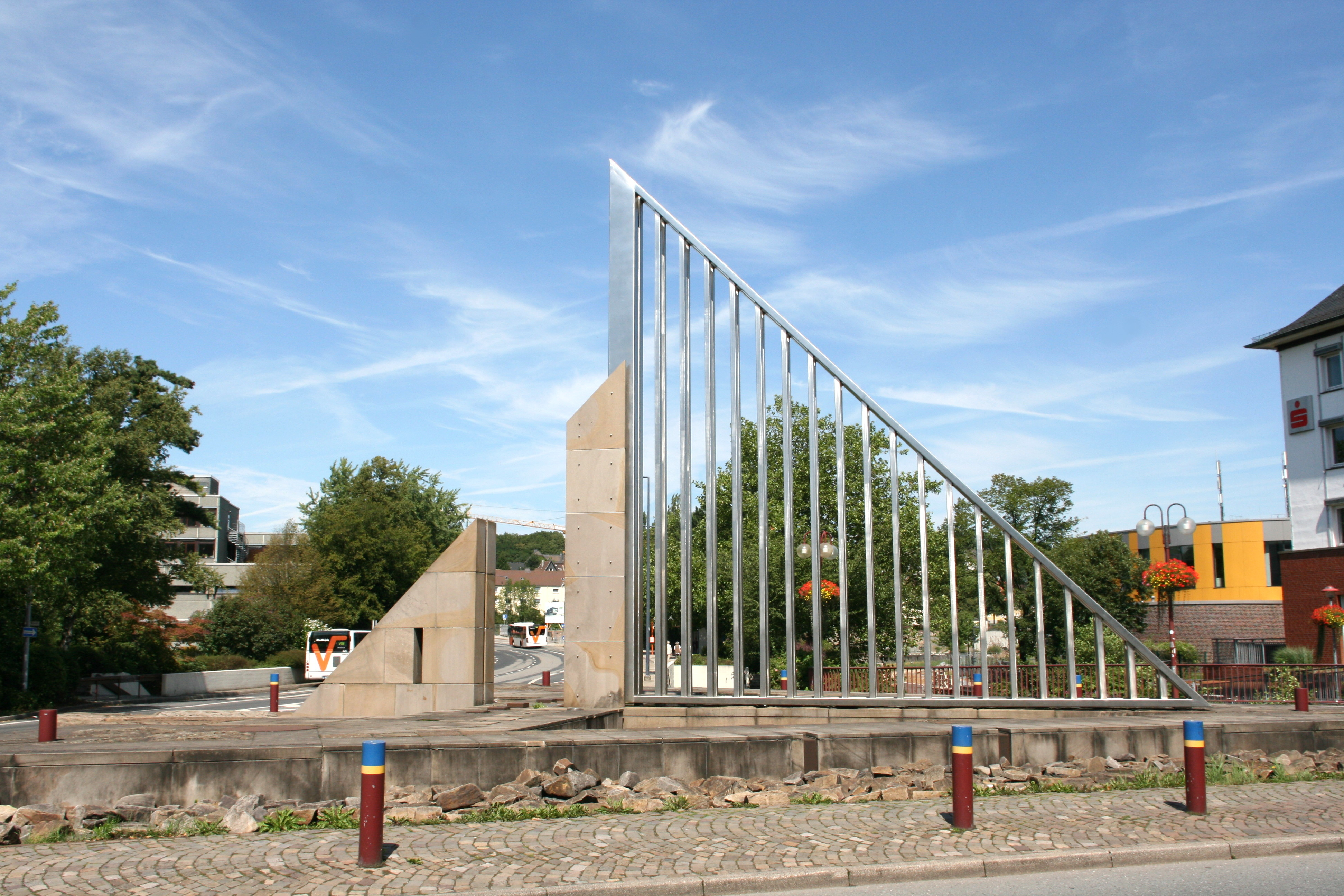 Stadtzeichen auf der Ennepebrücke der Mittelstraße / an der Wasserstraße in Gevelsberg